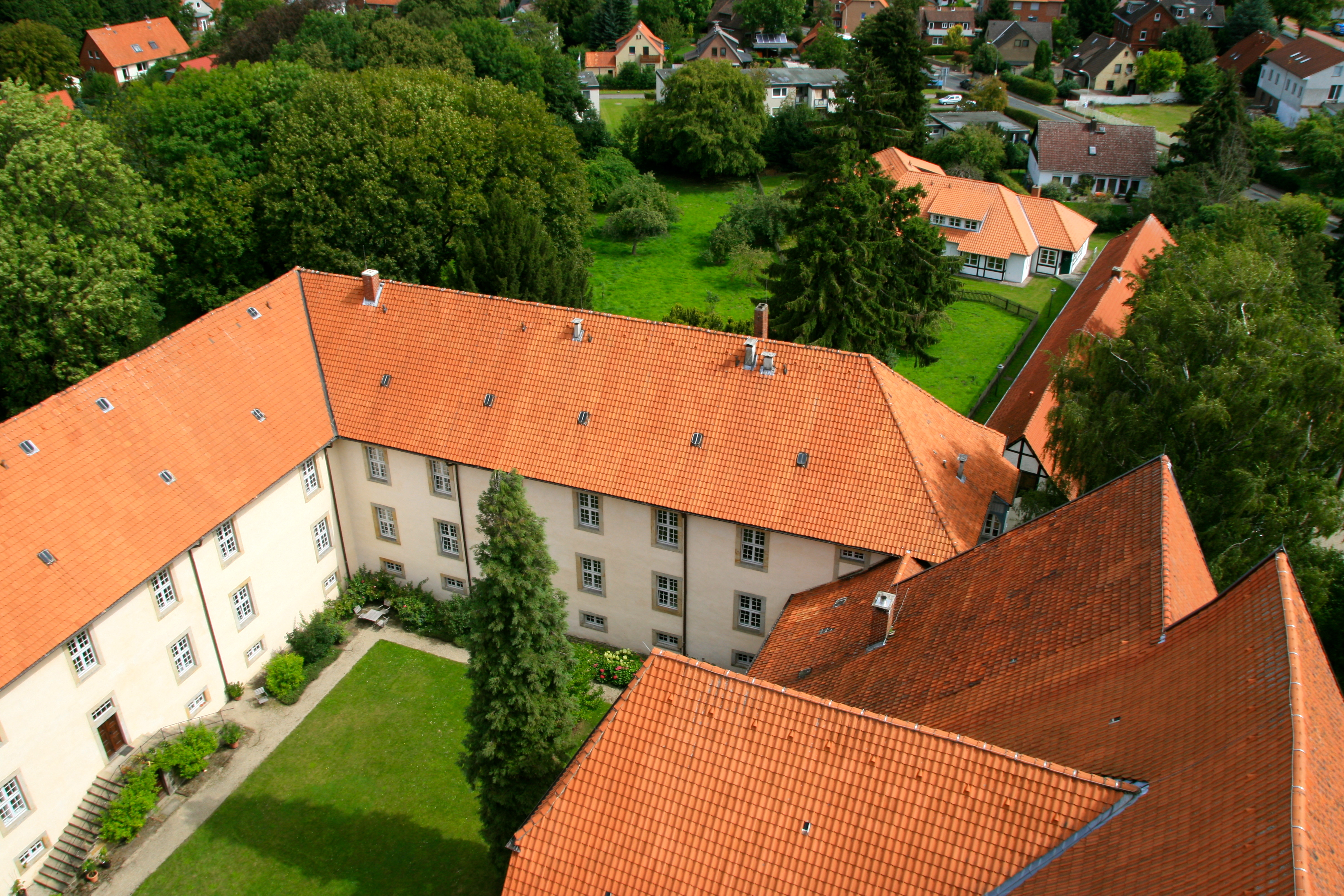 Kloster Wennigsen, August 2011. Klosteramthof 1, 30974 Wennigsen. Baudenkmal der Gemeinde Wennigsen (Deister). Aufnahme von der Spitze der Klosterkirche.